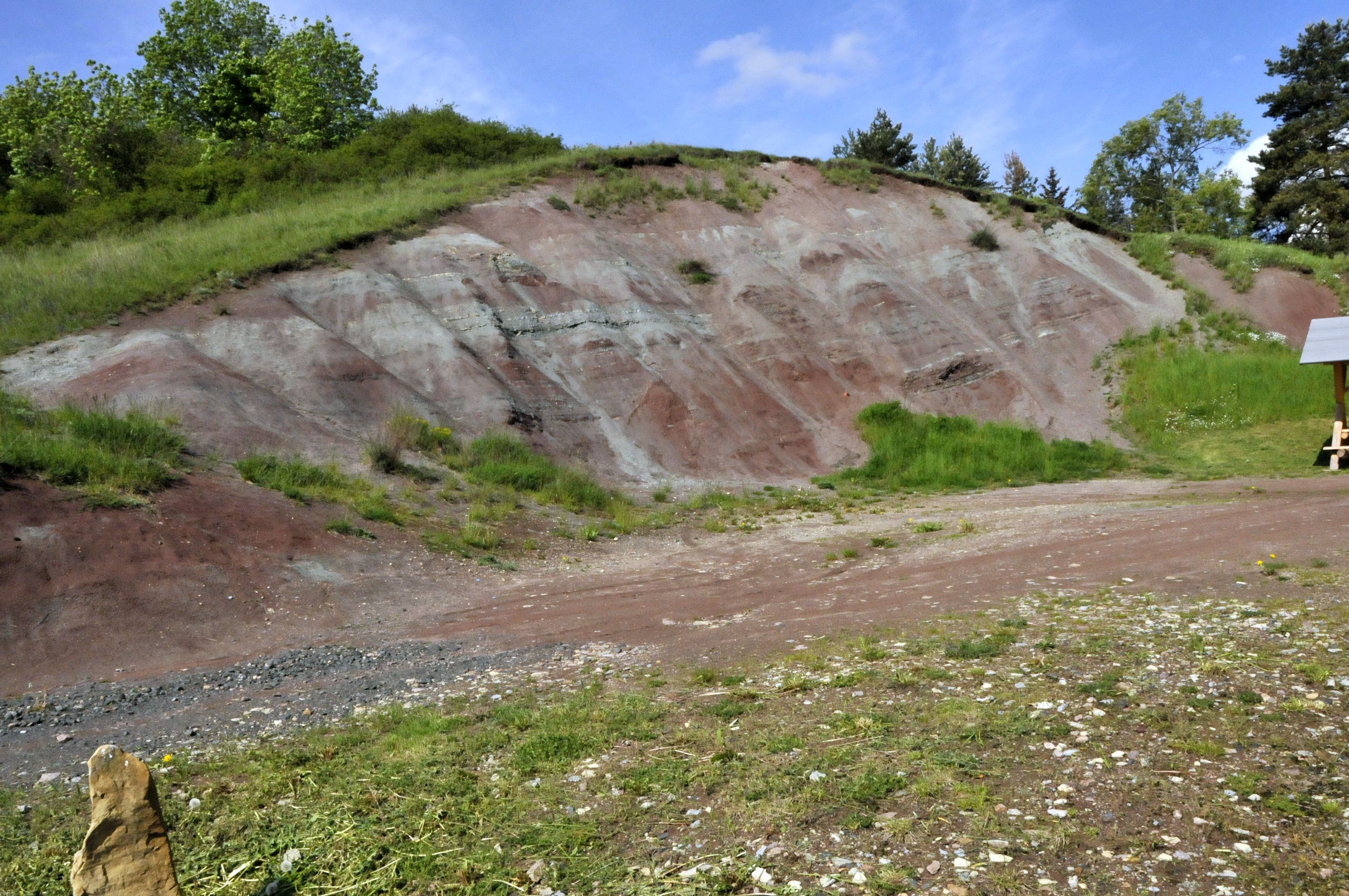 Geologische Aufschlüsse - Bad Lands - in Seebergen